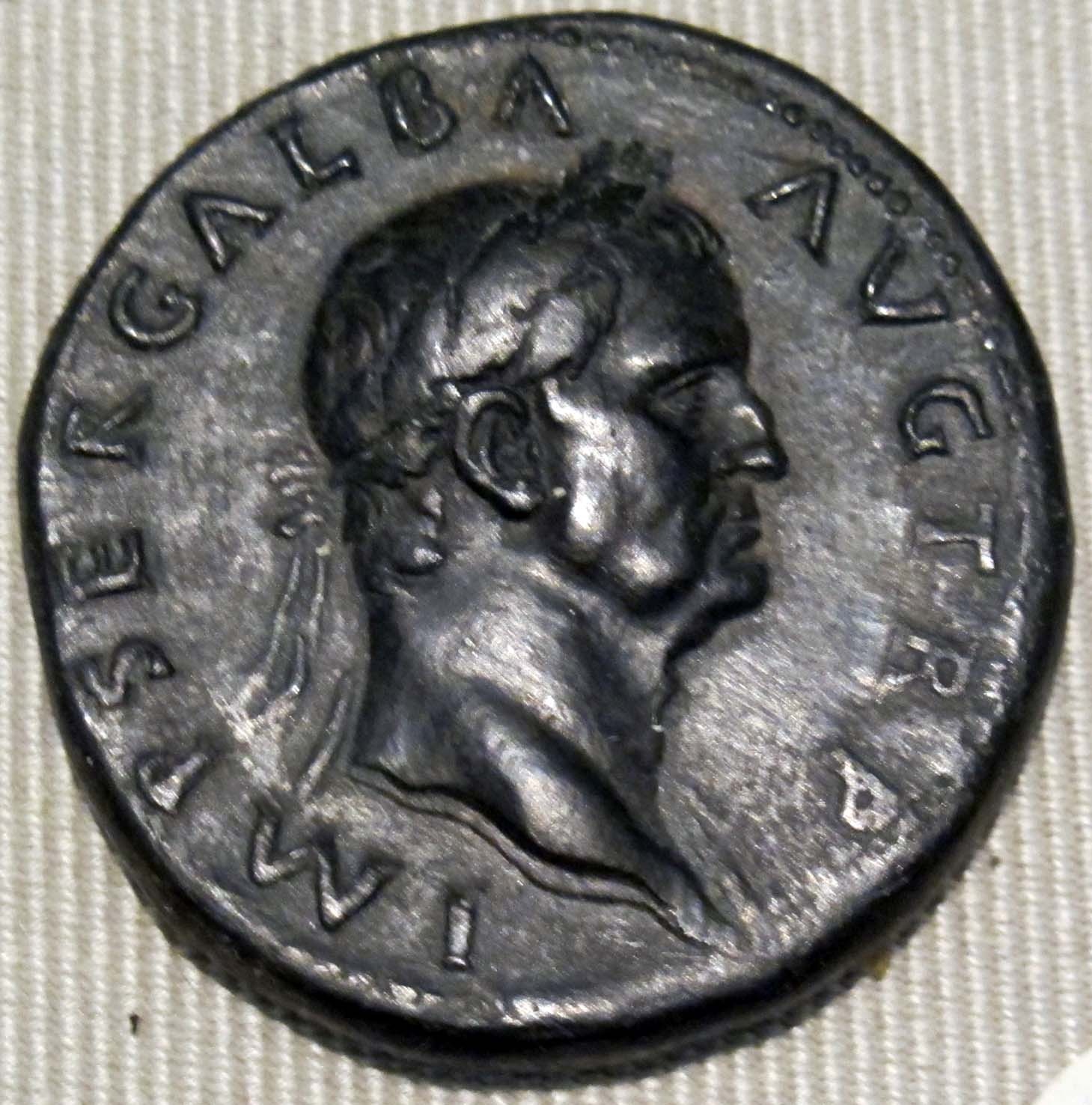 Impero, galba, sesterzio in oricalco (roma), 68-69 dc